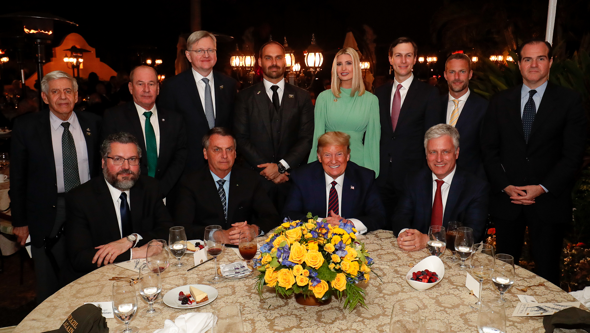 (Mar a Lago - Flórida, 07/03/2020) Presidente da República Jair Bolsonaro acompanhado do Senhor Presidente dos Estados Unidos Donald Trump, posam para fotografia.Foto: Alan Santos/PR